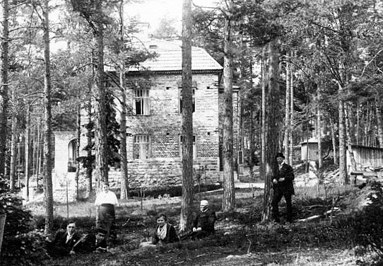 Vinterbo, Föreningsvägen 22 Vinterbo 1915, när det var nyuppfört. På bilden sitter Kasper Höglund och hans familj framför huset som ännu inte har blivit putsat.